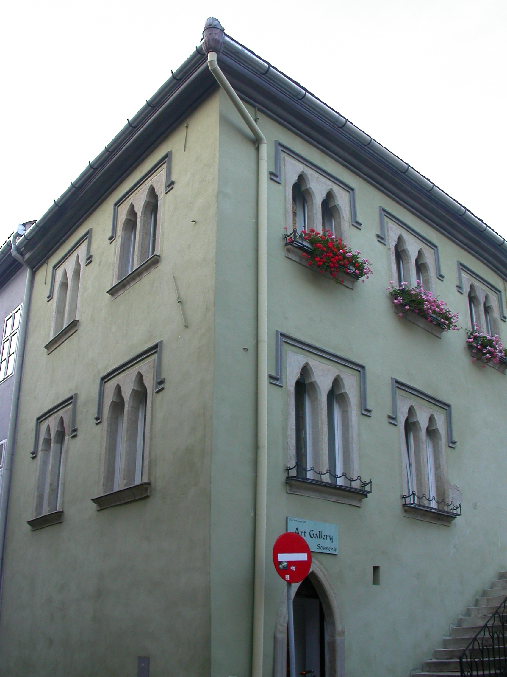 Casa Hoch-Casa Venețiană, azi sediul Forumului Democrat al Germanilor, sec. XV - XVI, sec. XVII, sec. XVIII